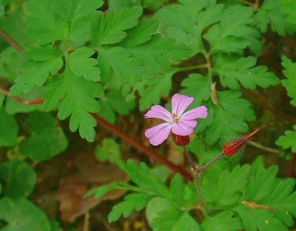 Géranium herbe à Robert, photo J.F. Gaffard, Gy, mai 2004.